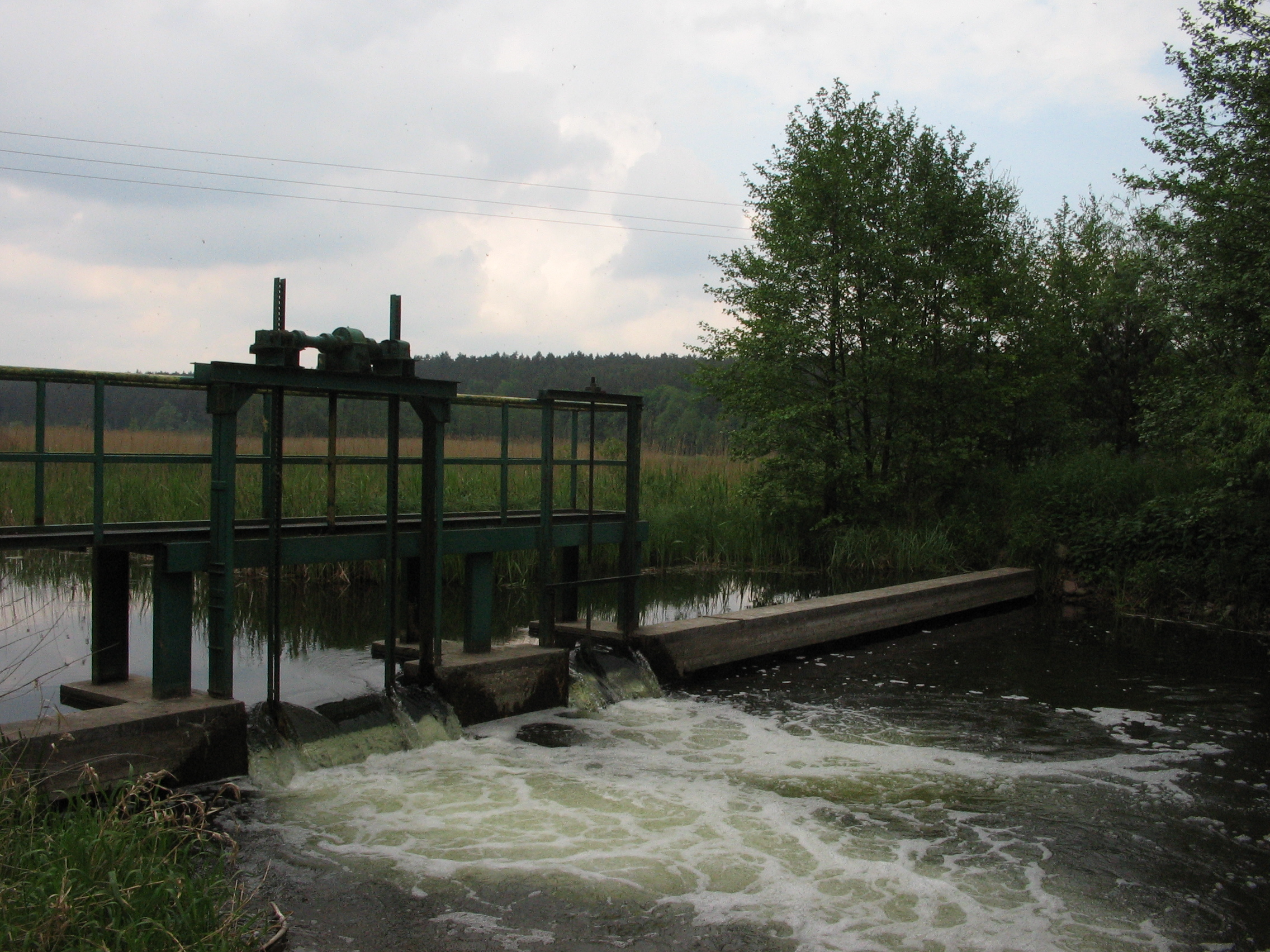 Jaz na rzece Skarlance w Tamie Brodzkiej